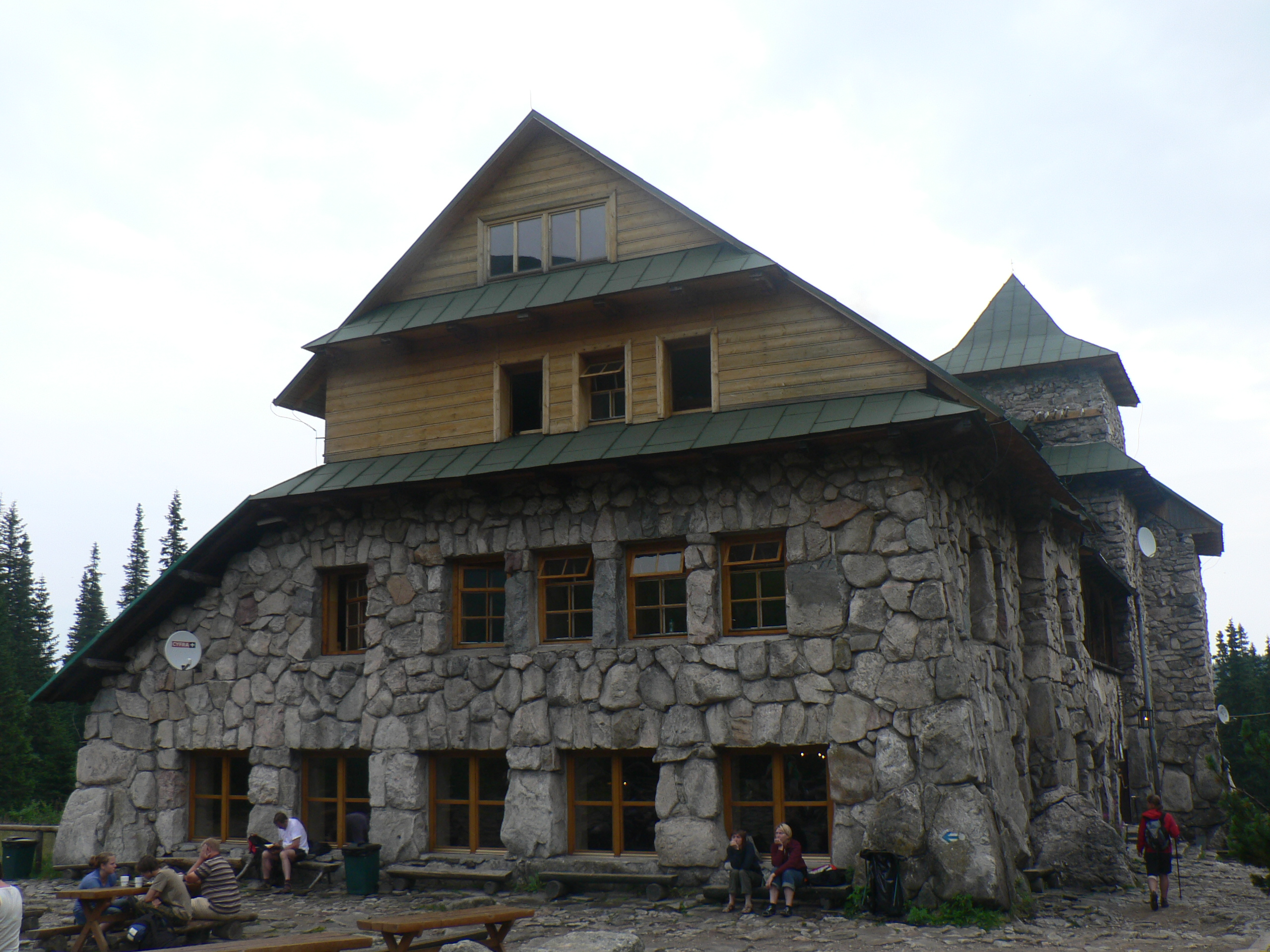 Schronisko PTTK "Murowaniec"